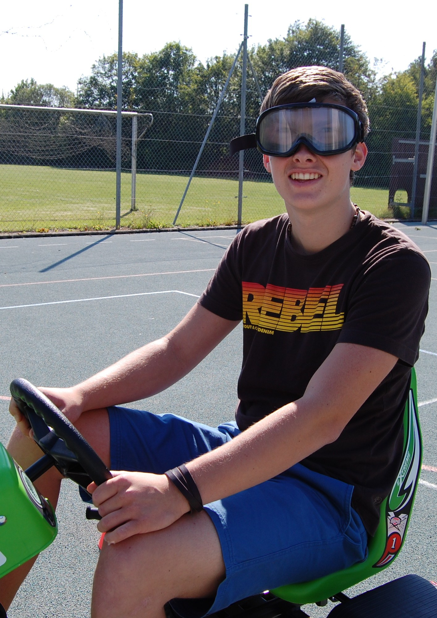 Eine 1,3-Promille-Rauschbrille, mit deren Hilfe das Fahren unter Alkohol- oder Drogeneinfluss demonstriert wird